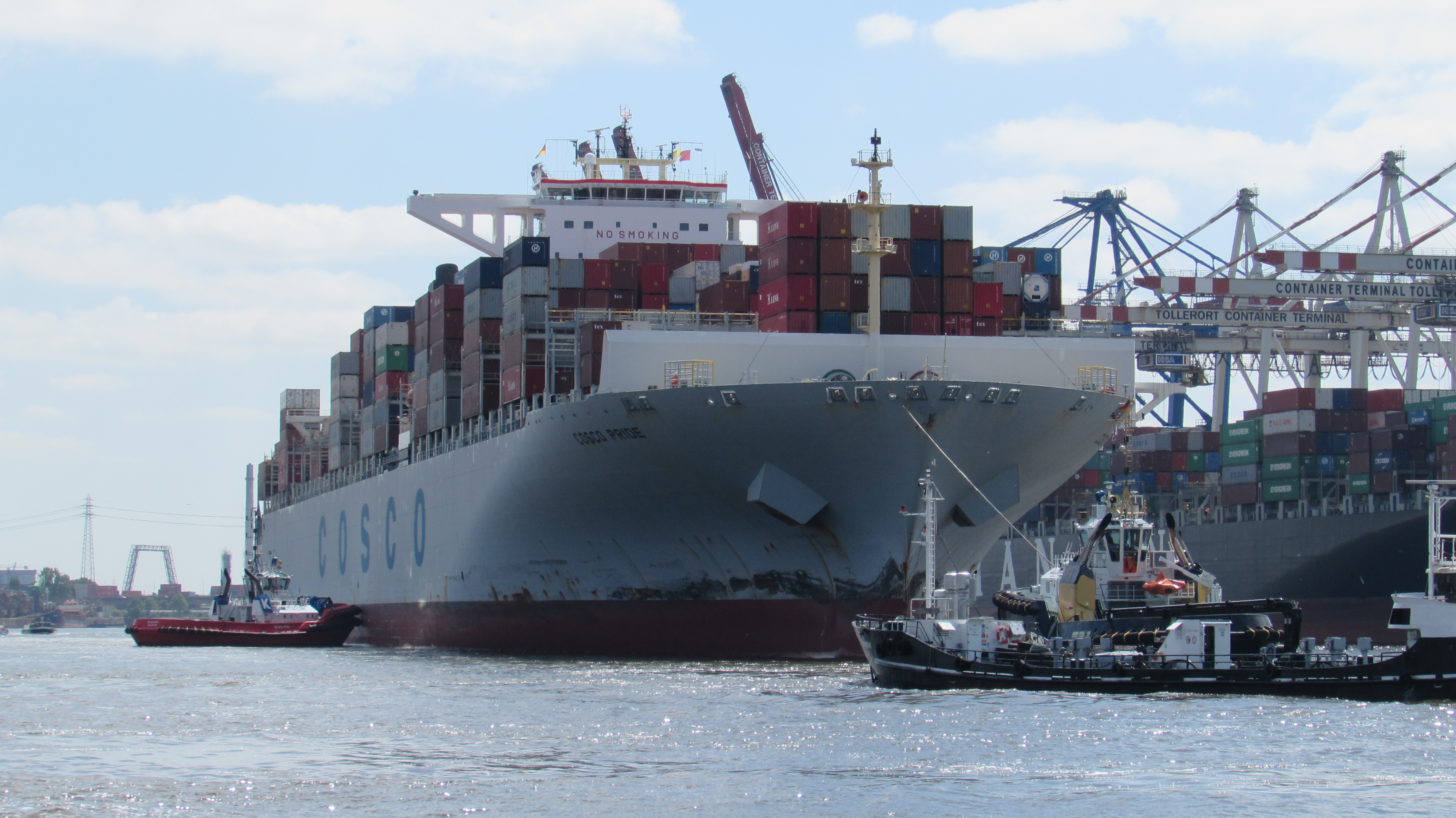 ContainerschiffCoscoHamburg